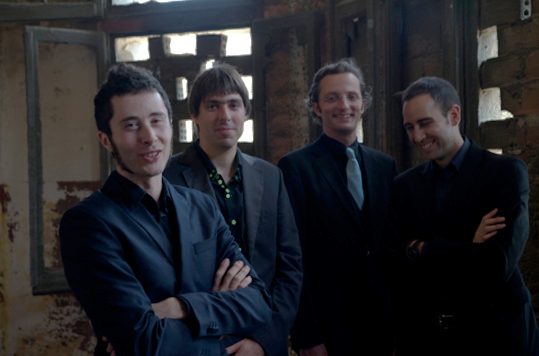 Foto dels components de Blaumut